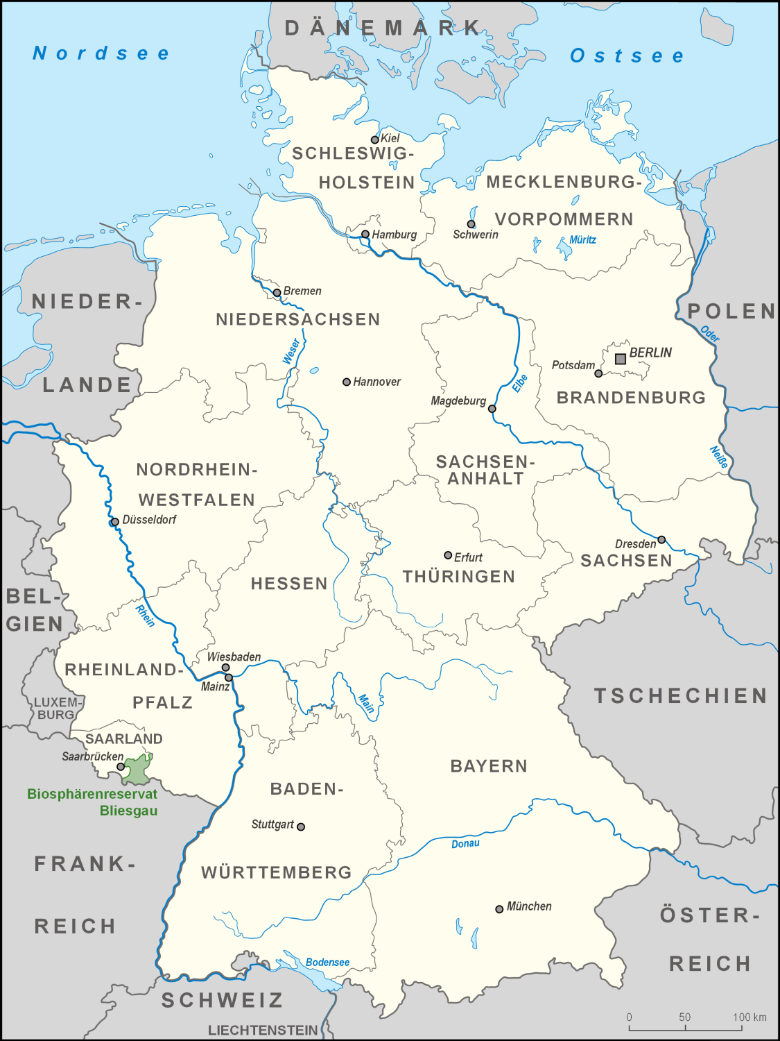 Karte des Biosphärenreservates Bliesgau in Deutschland